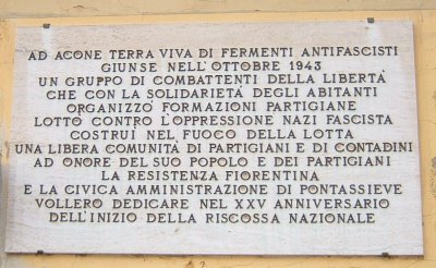 Lapide commemorativa posta sulla facciata della Cooperativa l'Emancipatrice nella frazione di Acone